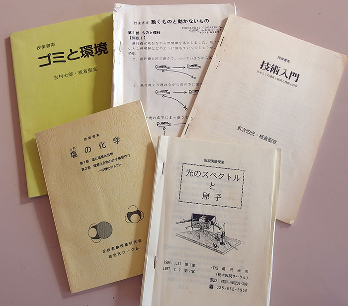 授業効果や科学的正しさが確立していない，研究途上の授業書は「授業書案」と呼ばれる。